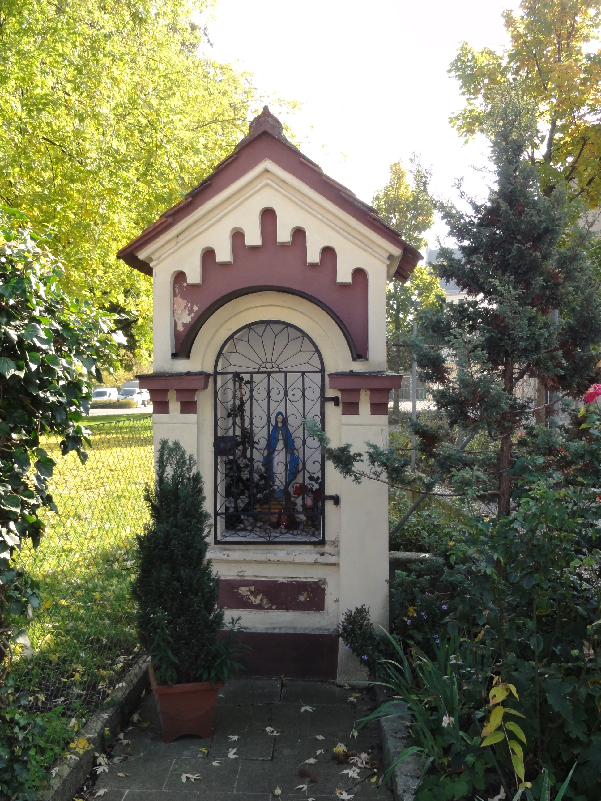 Nischenkapelle